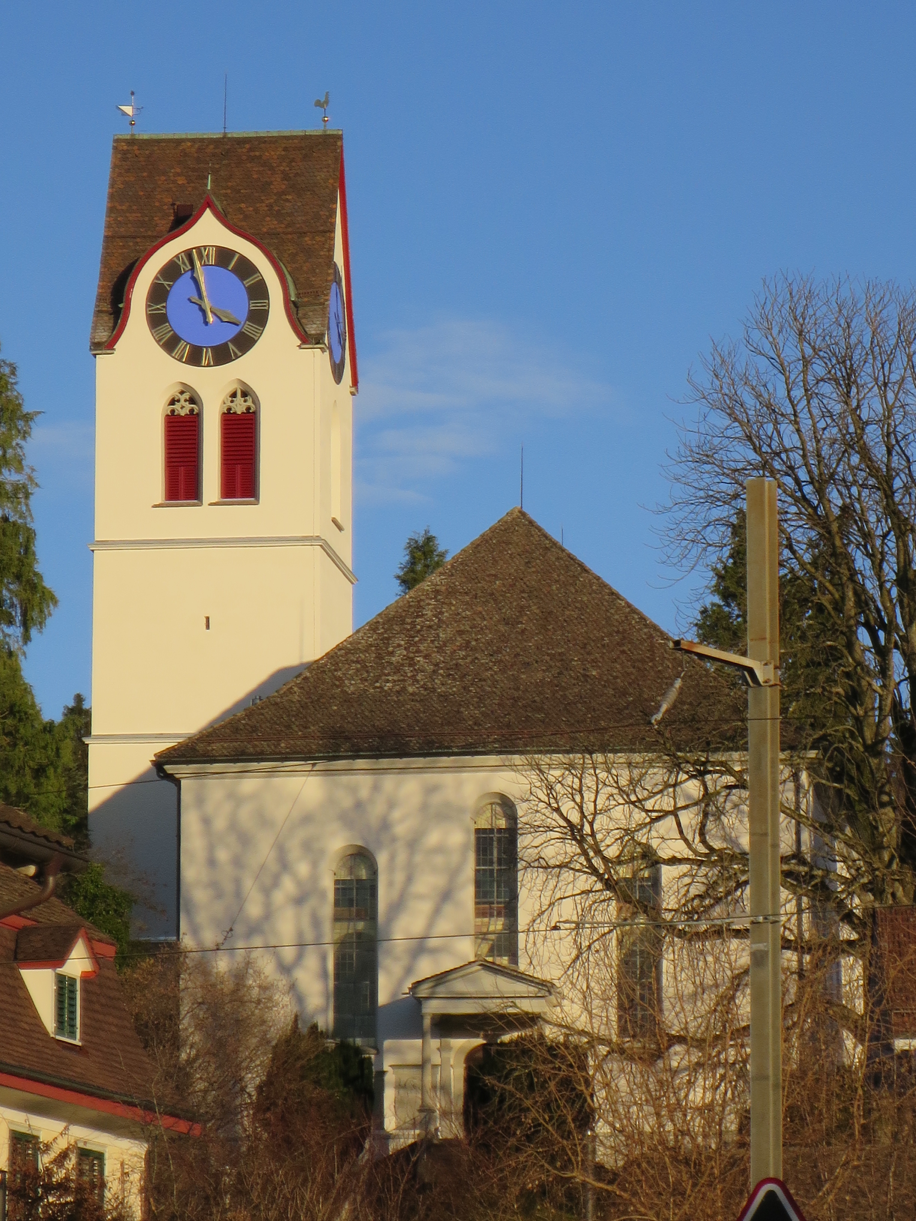 Ref. Kirche Hinwil, Schweiz, Aussen